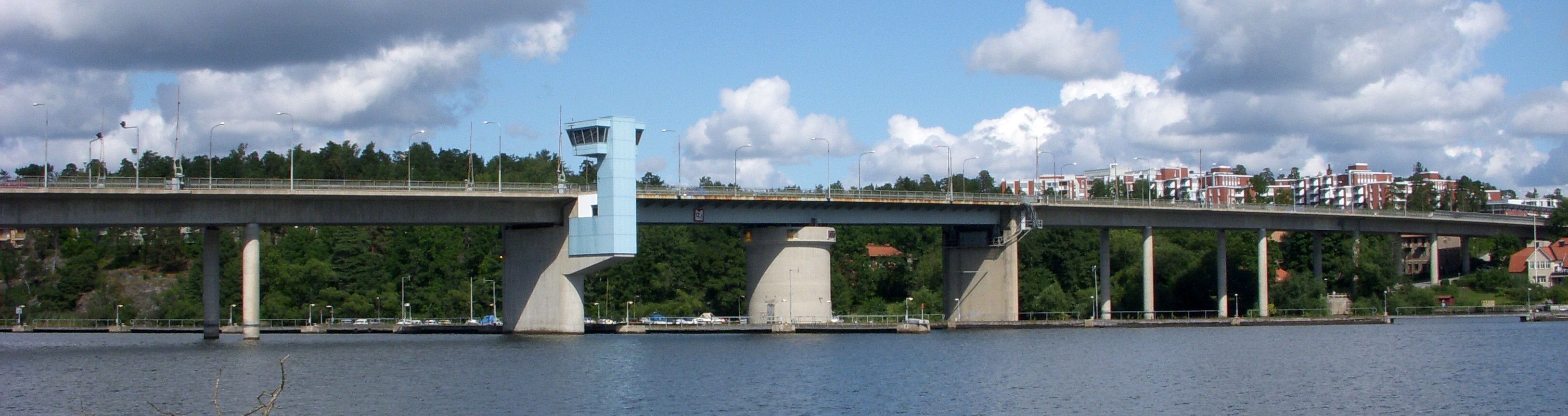 Nockebybron mellan Ekerö och Stockholm